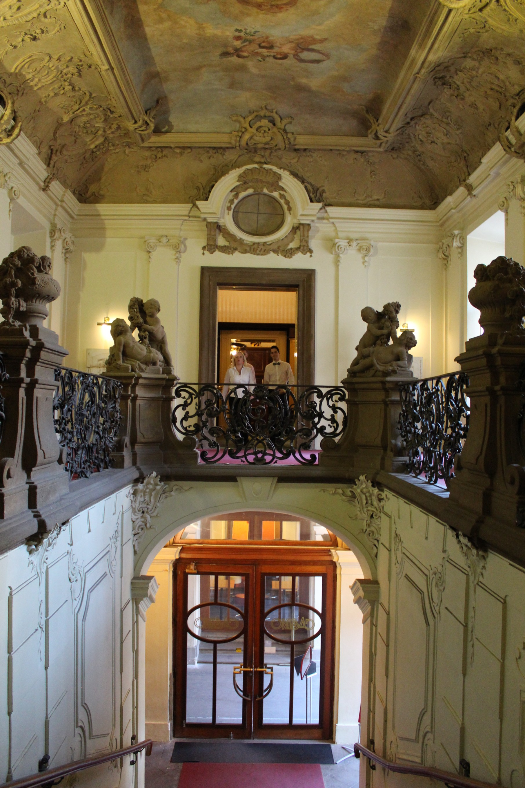 Palác Sylva-Taroucca